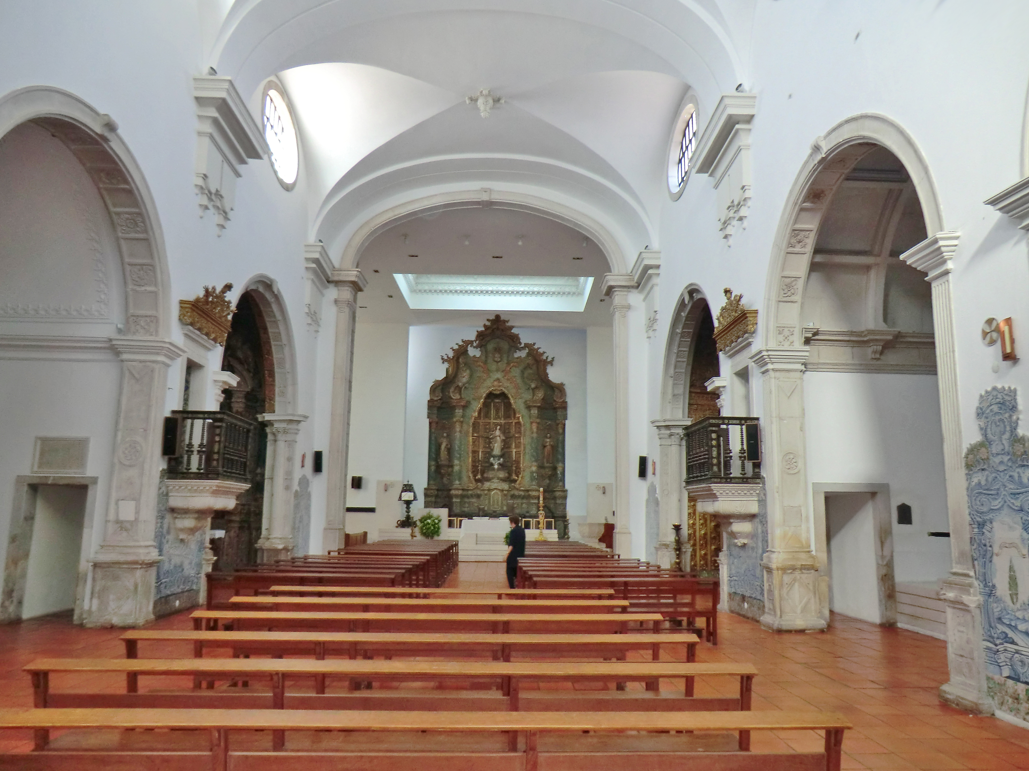 Sé Catedral de Aveiro ou Igreja de São Domingos This file was uploaded for Wiki Loves Monuments in Portugal with the unique identifier 73187.